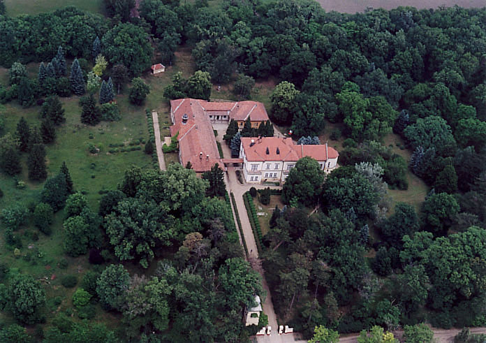 Palace - Törökszentmiklós - Hungary - Europe (Almásy Mansion)